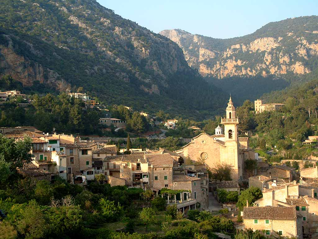 Valldemossa, Mallorca, Spain. K. Korlević